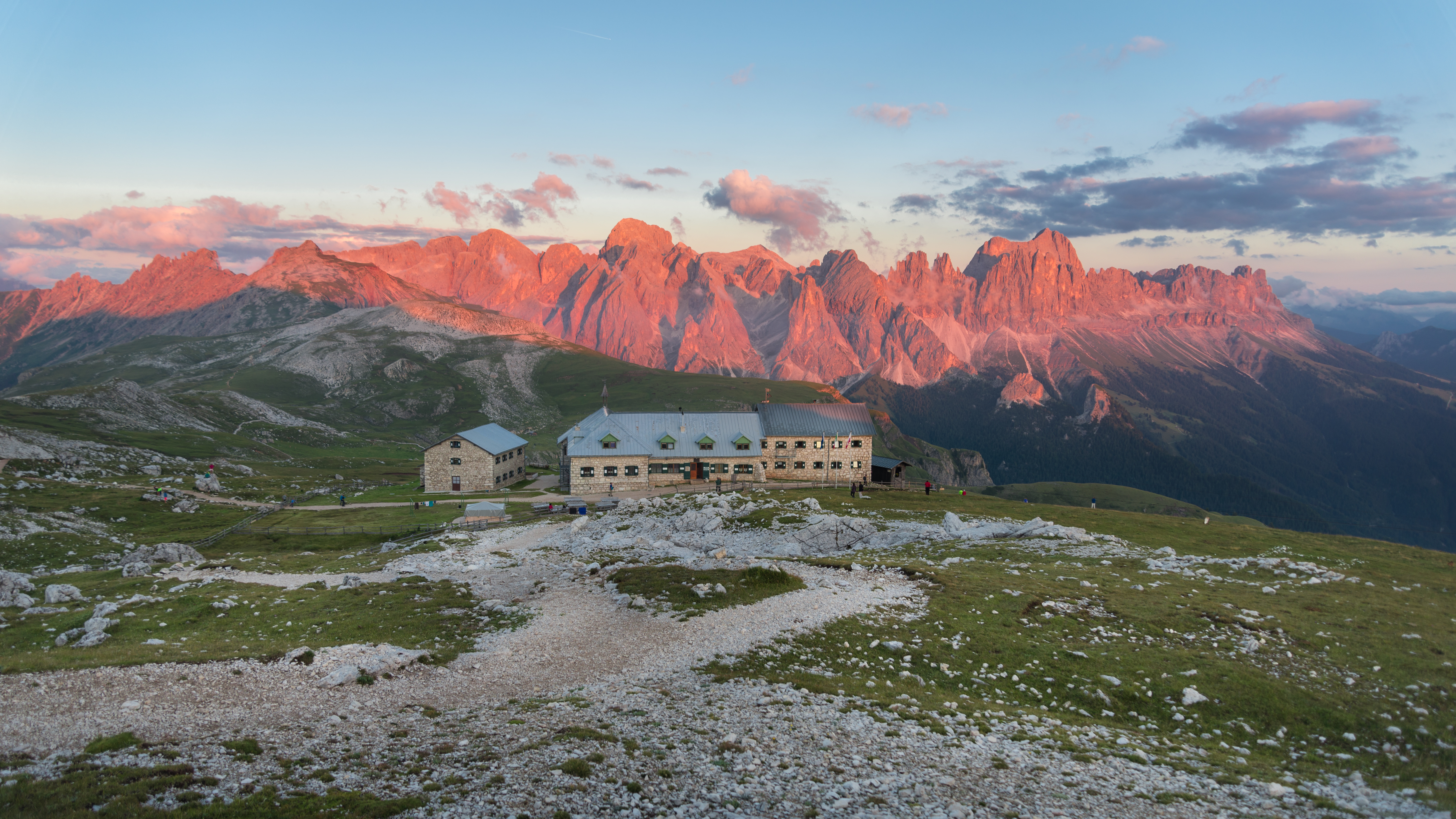 Parco naturale dello Sciliar-Catinaccio, rifugio Bolzano